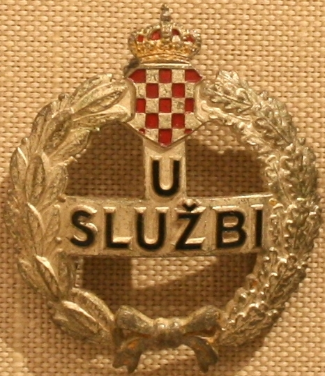 Policajski znak Banovine Hrvatske u Muzeju grada Zagreba snimljeni tijekom Noći muzeja